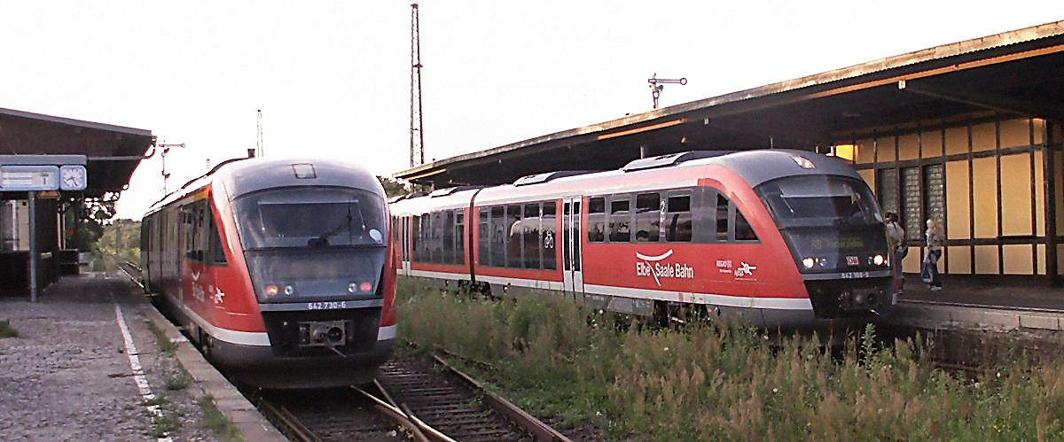 Akener Bahn 2007